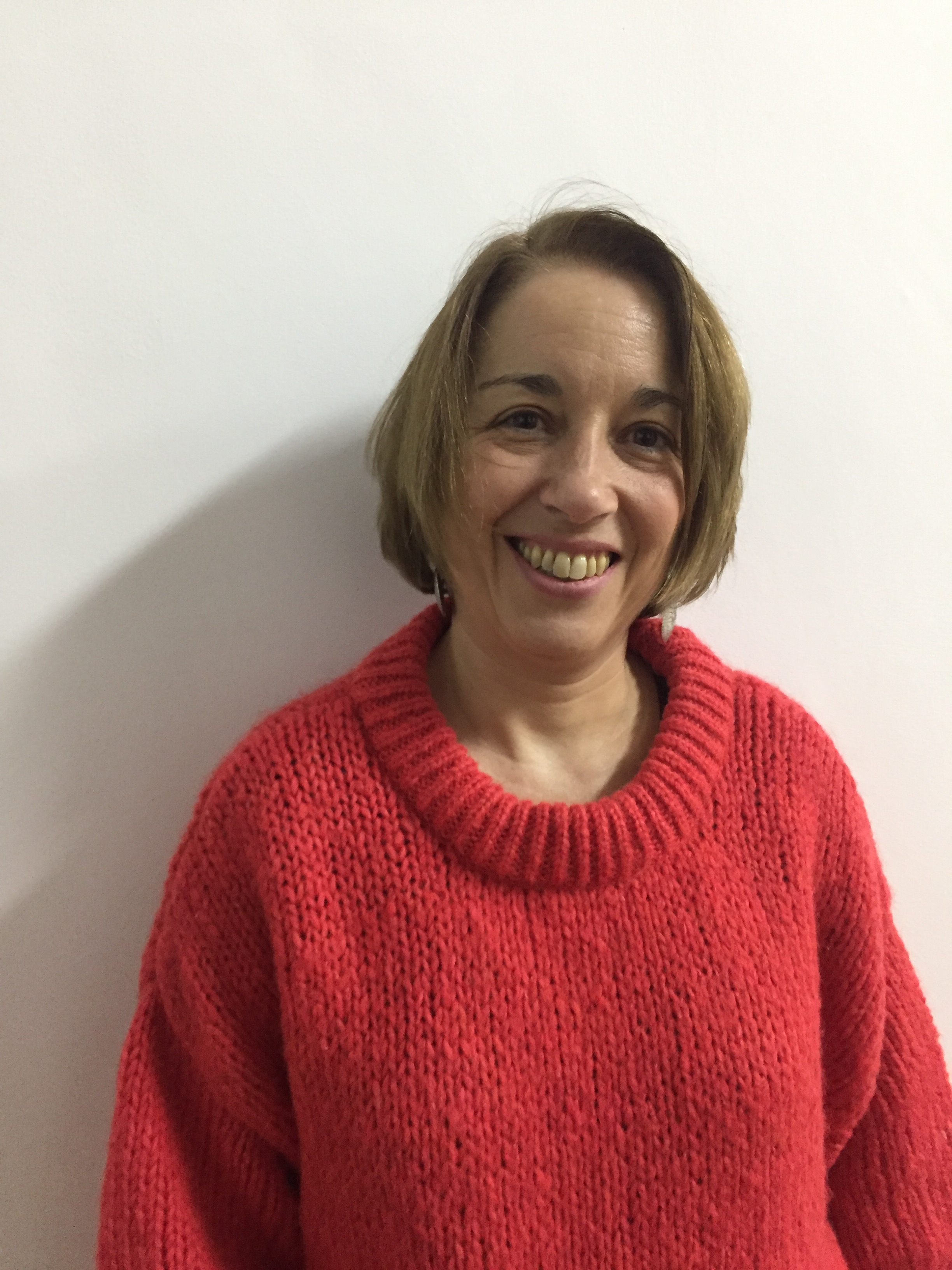 En asamblea Mav 2018